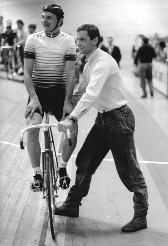 Bernd Drogan, Lutz Heßlich ADN-ZB Oberst 7.1.89 Berlin: Solidaritätsrennen Ehemalige Prominente des Radsports beteiligten sich am Wochenende an einer Sonderveranstaltung auf der Berliner Winterbahn, deren Erlös auf das Solidaritätskonto zugunsten der Erdbebenopfer in Armenien überwiesen wird. Starthilfe leistet hier Doppelolympiasieger im Sprint Lutz Heßlich seinem Klubkameraden und ehemaligen Straßenweltmeister Bernd Drogan, der jetzt Trainer im Sportclub Cottbus ist. Abgebildete Personen: Drogan, Bernd: Radrennfahrer, Friedensfahrtteilnehmer, DDR Heßlich, Lutz: Radrennsportler, DDR